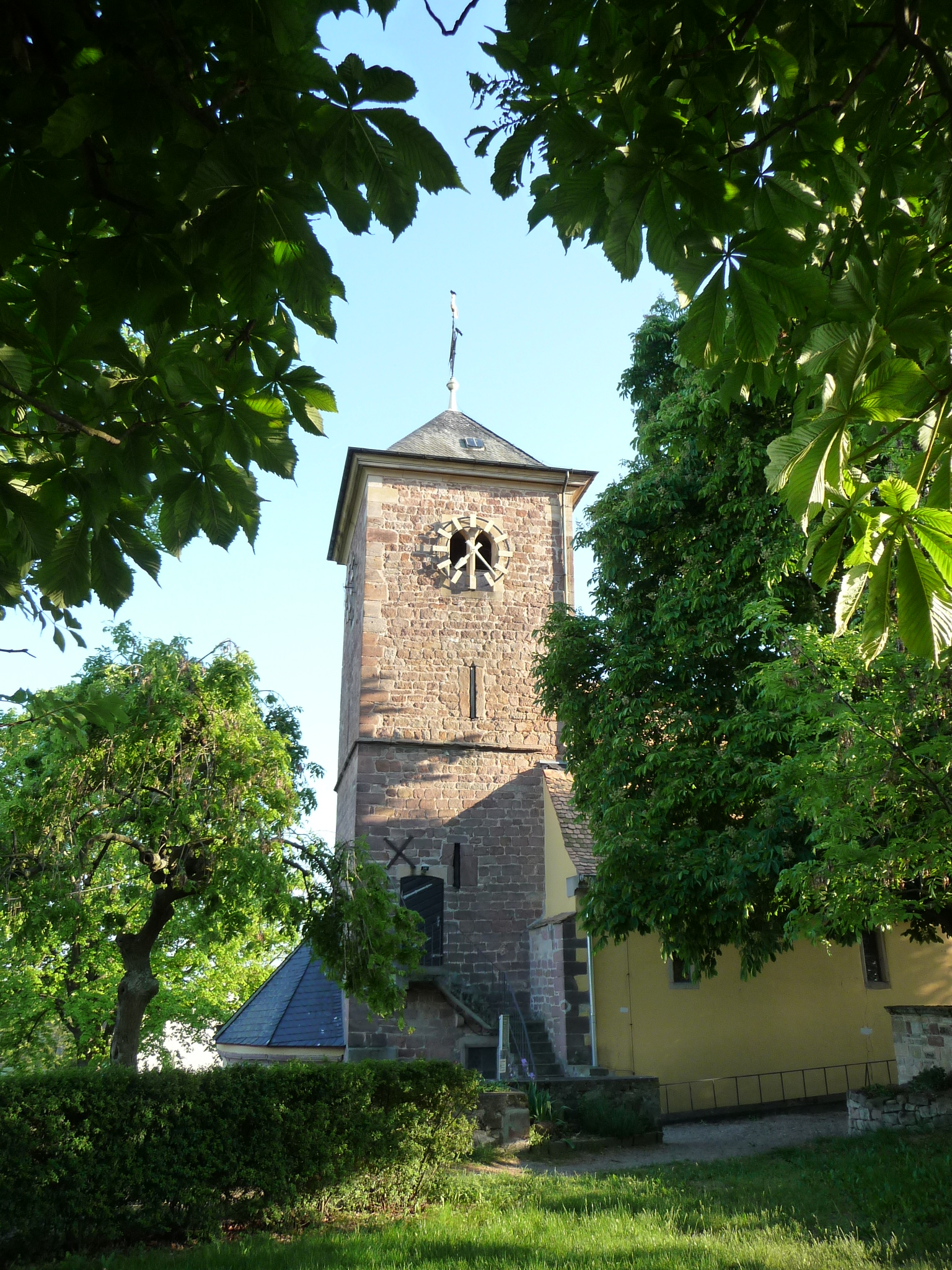 Herxheim am Berg ist eine Ortsgemeinde im Landkreis Bad Dürkheim in Rheinland-Pfalz. Sie gehört der Verbandsgemeinde Freinsheim an.